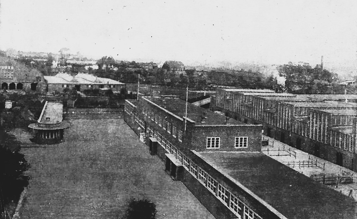 Verwaltungsgebäude von oben gesehen.